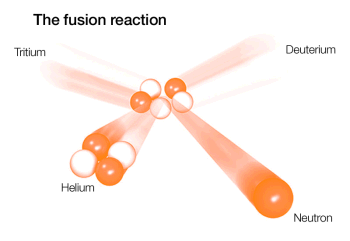 mynd af kjarnasamruna